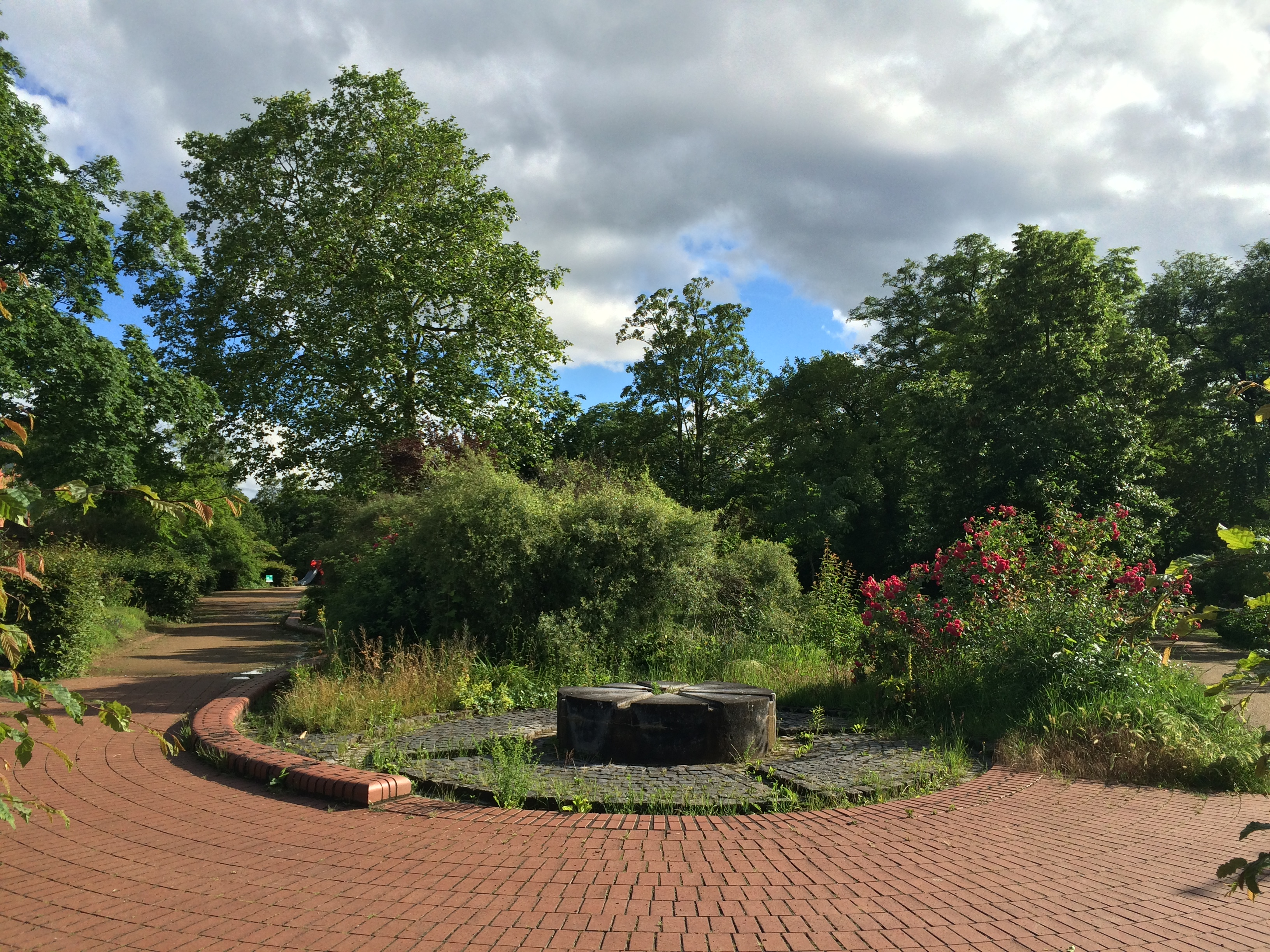 Der Ingelheimer Garten ist eine dreieckige Parkanlage in Darmstadt, die nach der gleichnamigen Stadt benannt ist.